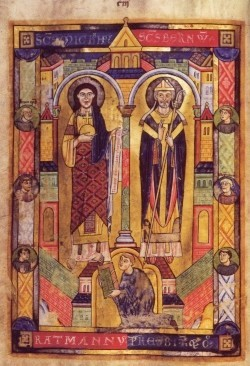 Hildesheim, Dommuseum, Ratmann-Sakramentar, Widmungsbild: Priestermönch Ratmann übergibt den Codex dem Erzengel Michael und Bischof Bernward